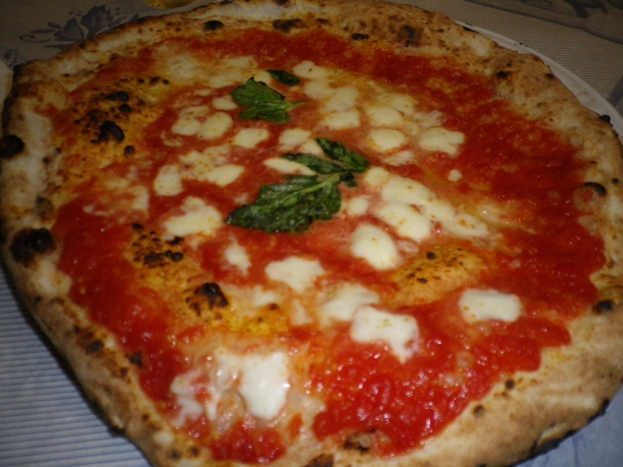 pizza napolitanaPentax Optio H90